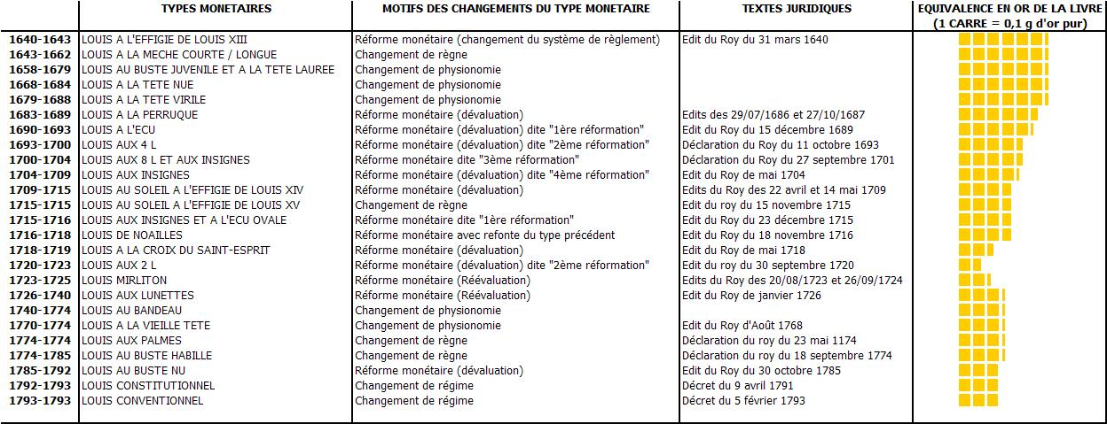 Auteur : Philippe PESCATORE